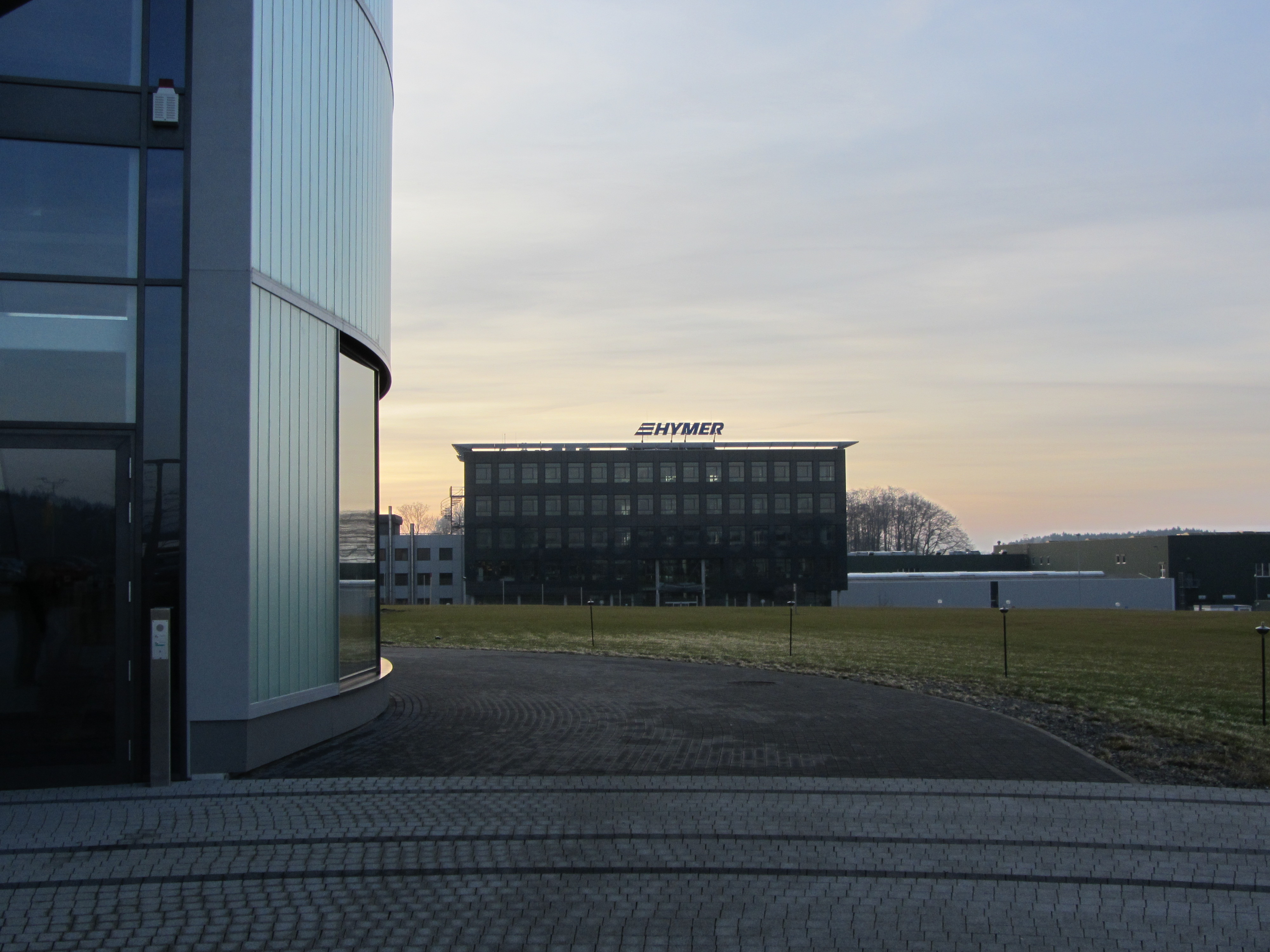 Hymer-Werk gegenüber dem Erwin-Hymer-Museum